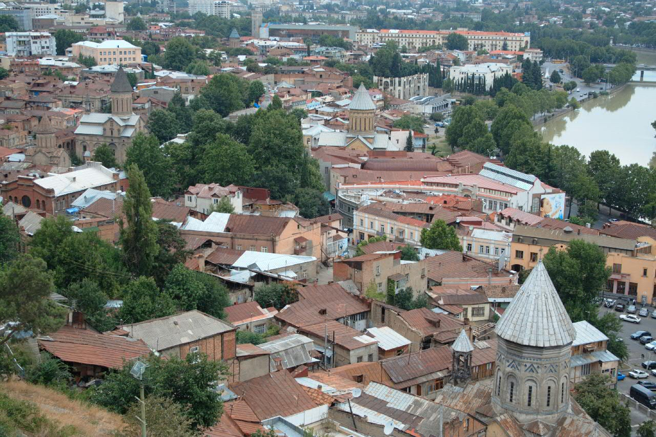 vue depuis la forteresse Narikala